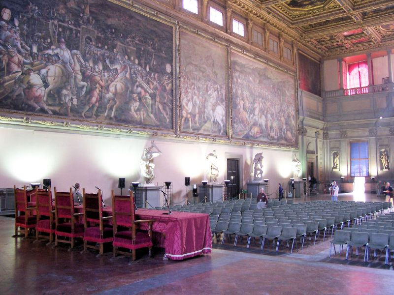 Piazza Della Signoria, Firenze, Italia